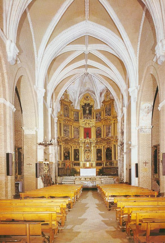 Vista del interior de la iglesia del monasterio.